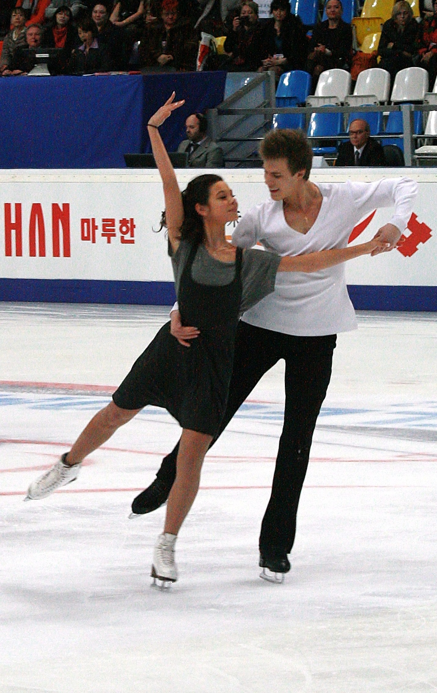 Елена Ильиных и Никита Кацалапов на Кубке Ростелекома 2012. Произвольный танец.